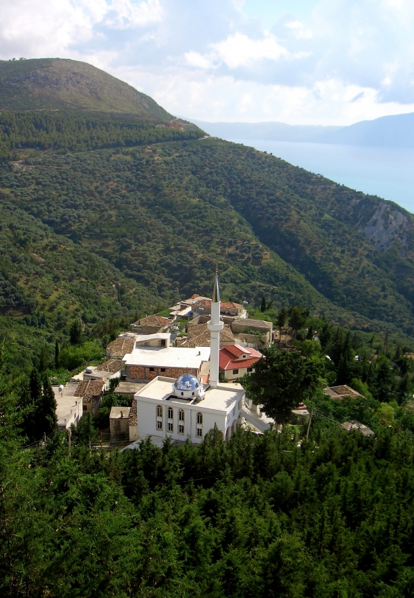 neue Moschee im Zentrum des Dorfes Kanina bei Vlora (Albanien)